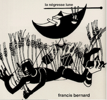 couverture livre